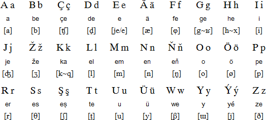 Современный латинский алфавит туркменского языка